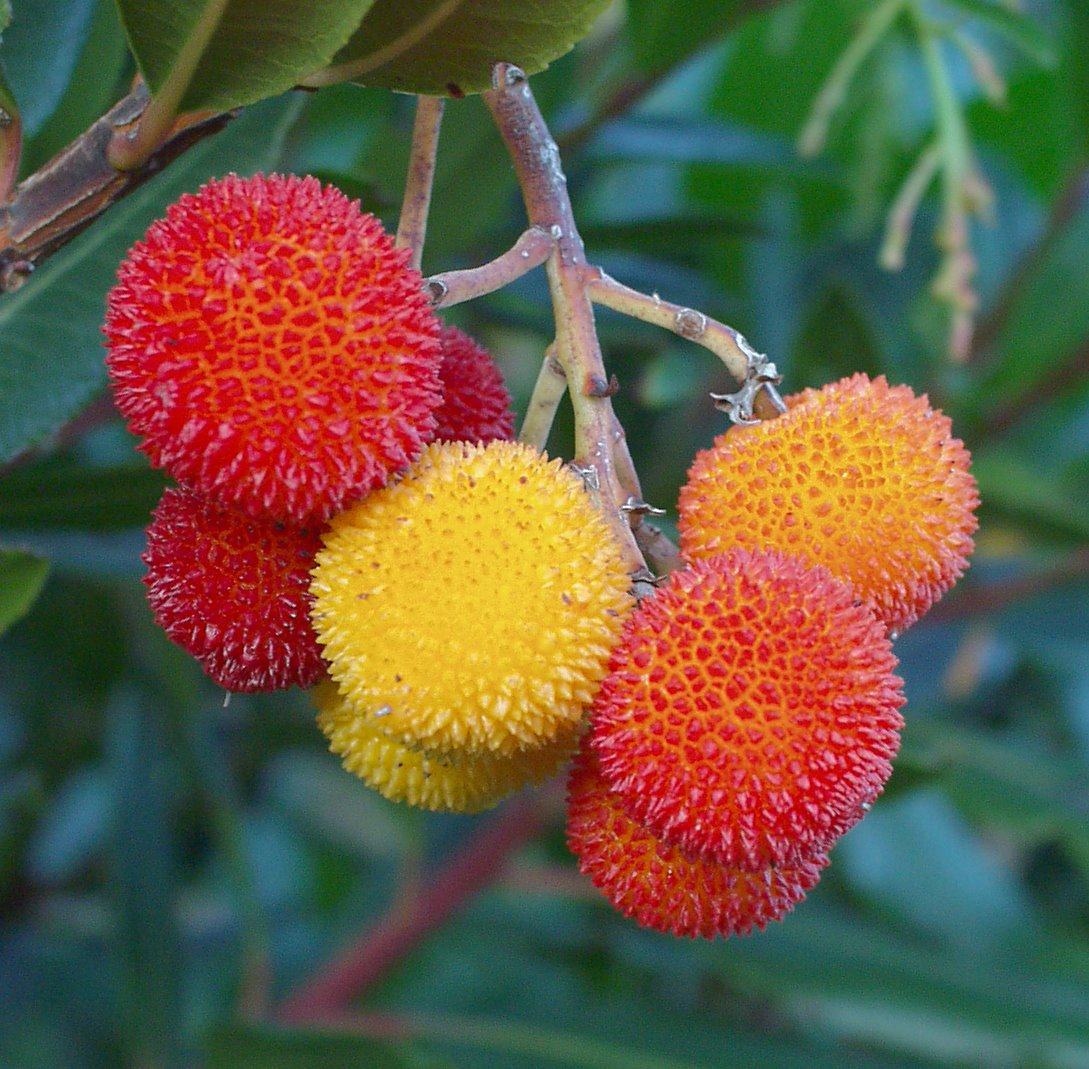 Arbutus berries (Palombaggia, Corsica)